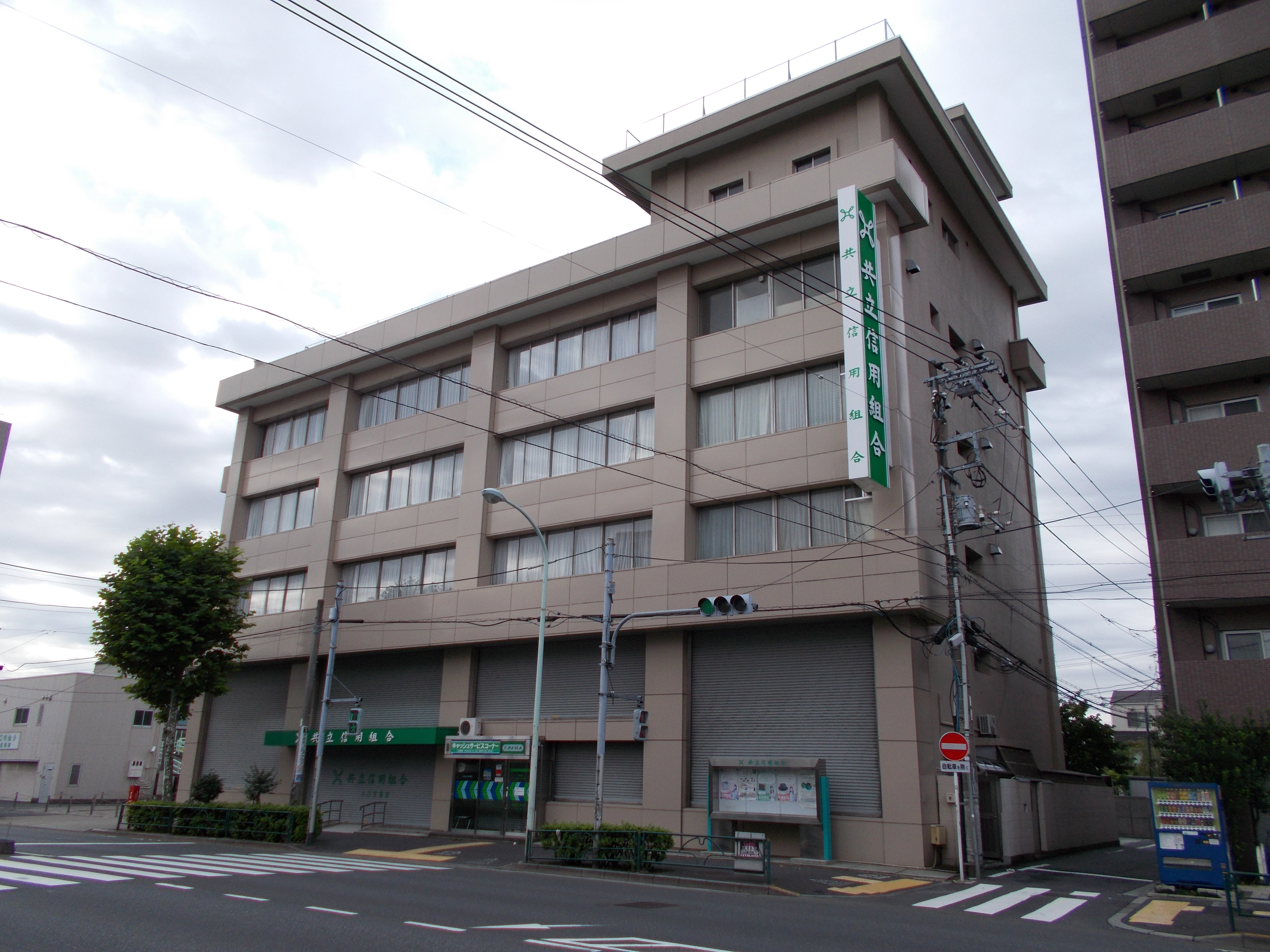 共立信用組合